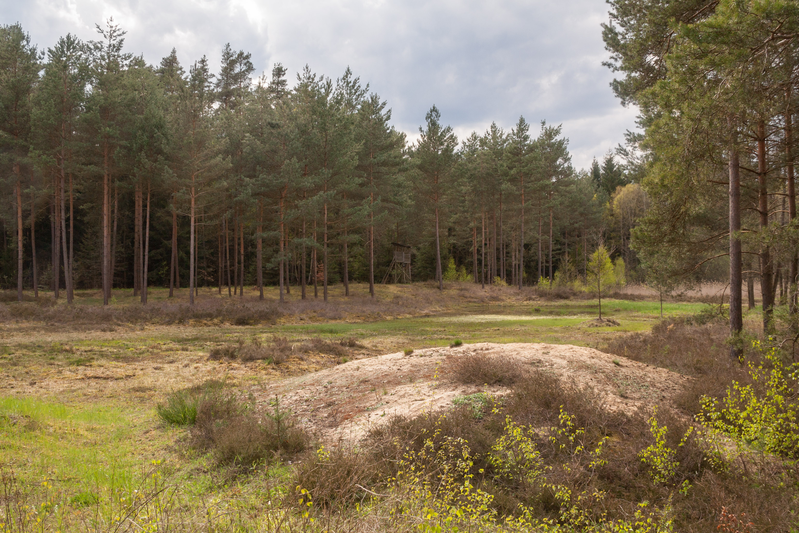 Sandgrube Heinleinshof, Burgthann, Geschützte Landschaftsbestandteil